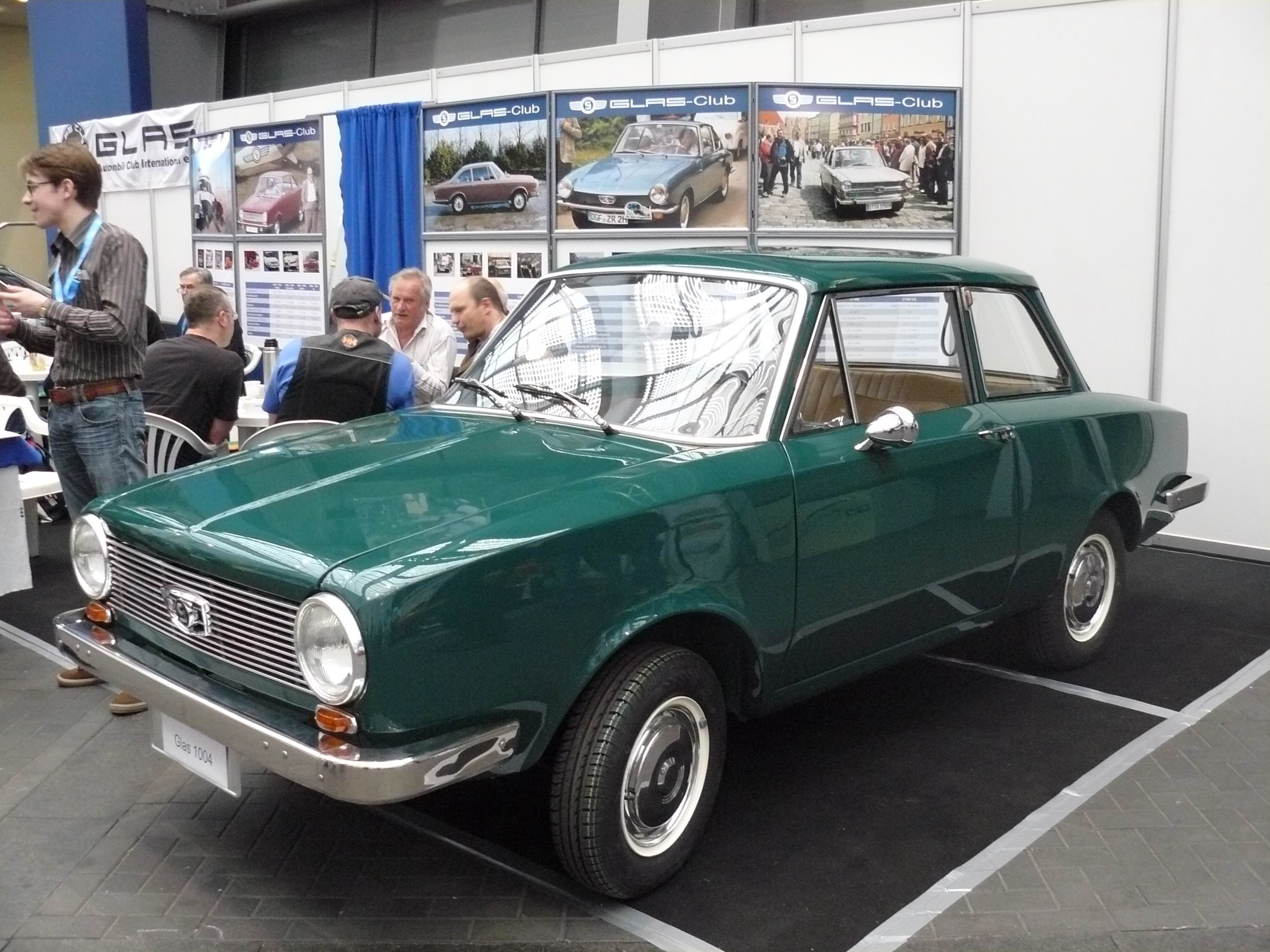 Essen 2011